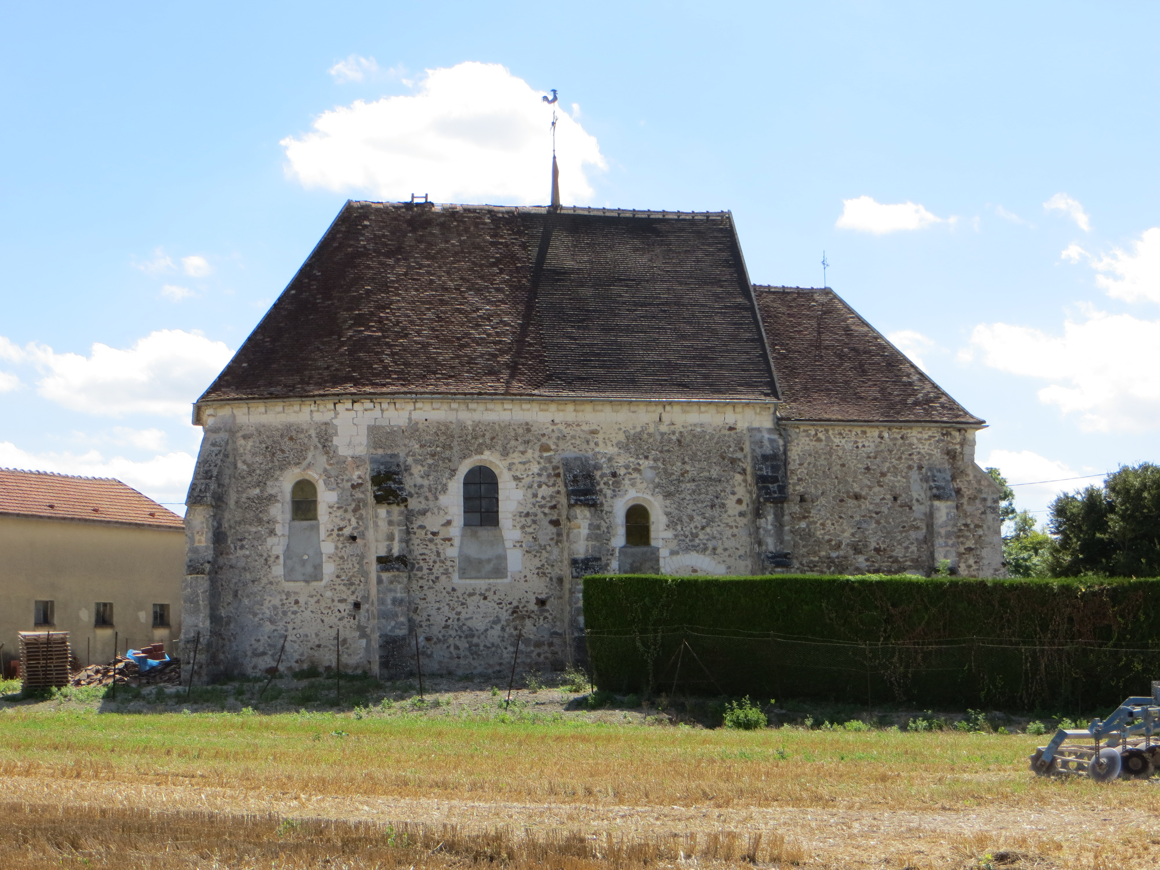 Vue générale de l'église